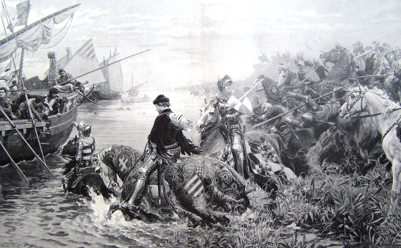 RETTUNG DES KÖNIGS SIGISMUND VON UNGARN